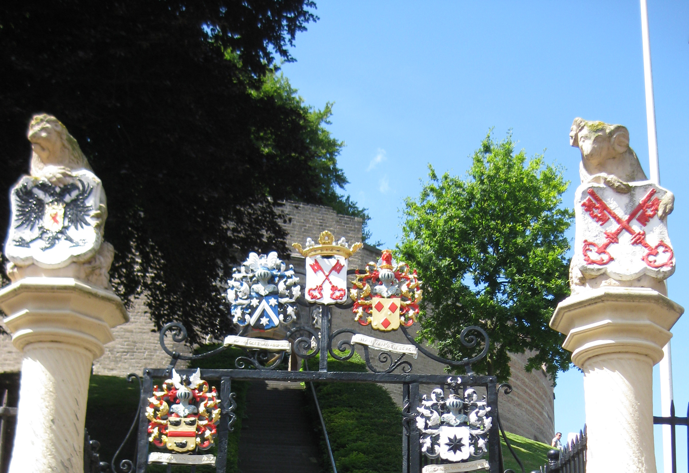 Voorpoort voor De Burcht in Leiden. Ontworpen door Willem van der Helm. Beelden van Rombout Verhulst.